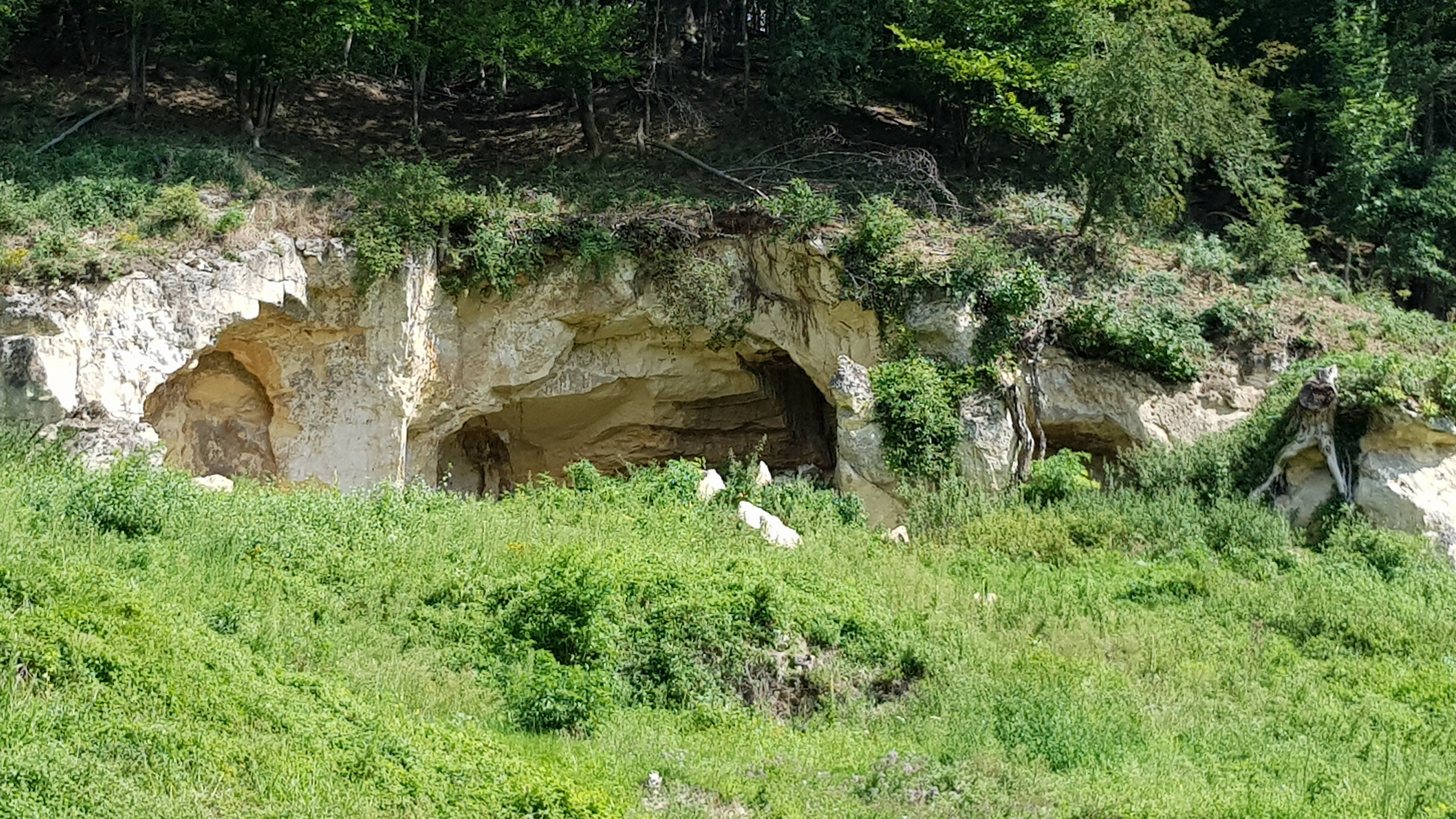 Mettenberggroeve III, Bemelen, Nederland